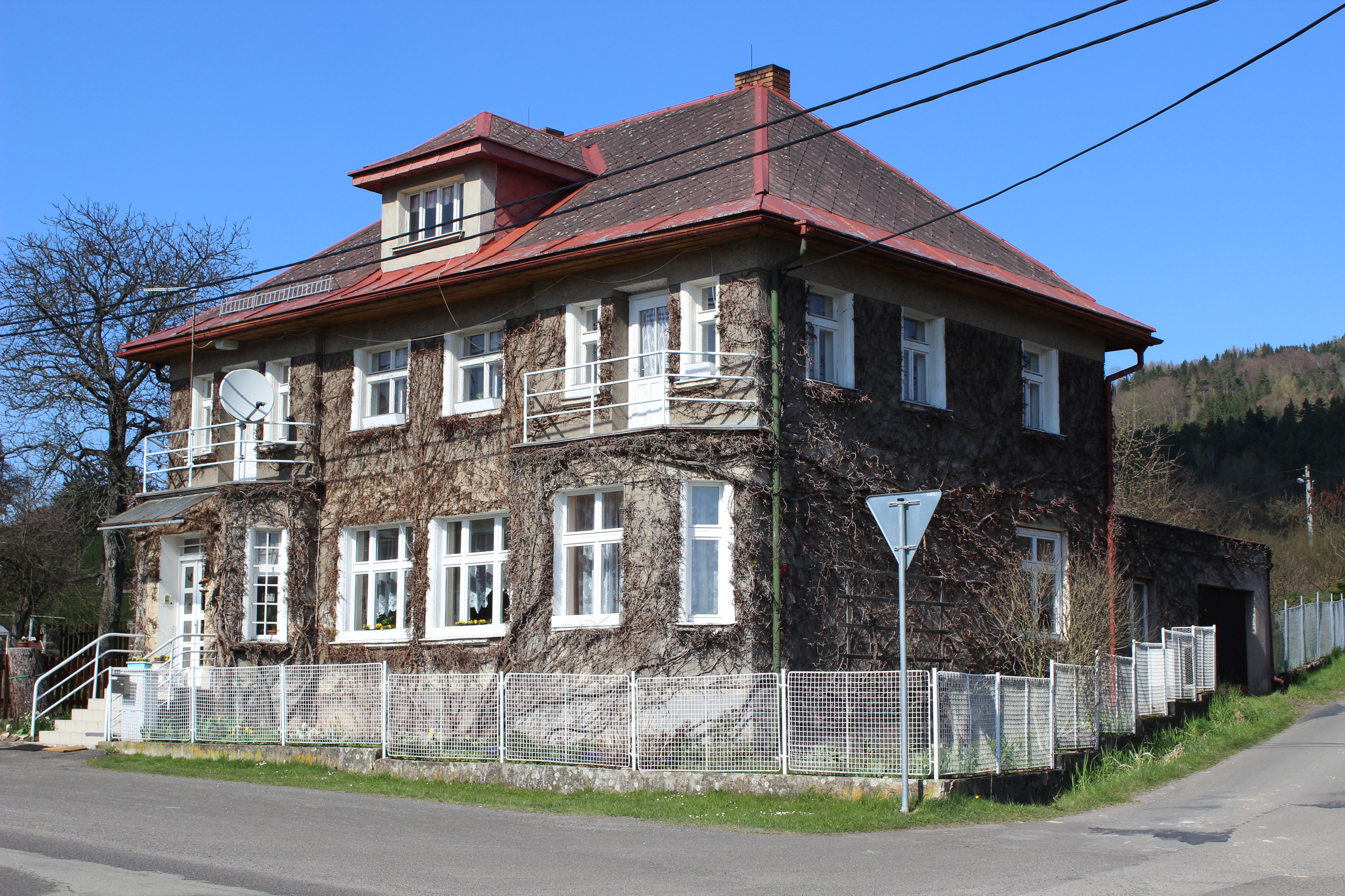 Dům číslo popisné 48 ve Smrčí, části Mírové pod Kozákovem.